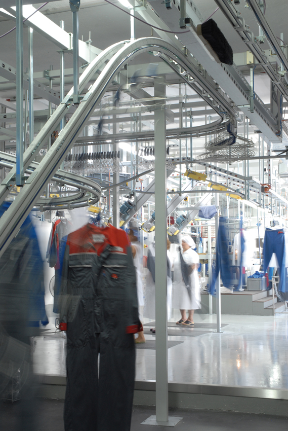 Sortieranlage im Betrieb Linzer Straße (Wien) des Unternehmens Salesianer Miettex.